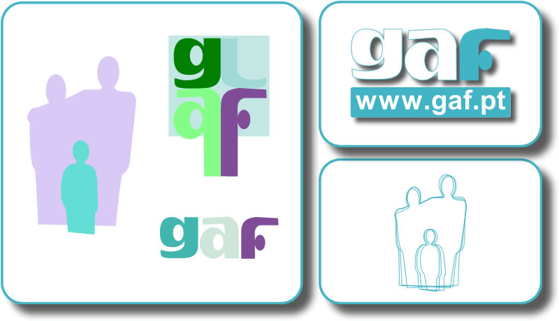 Histórico Logótipos do GAF